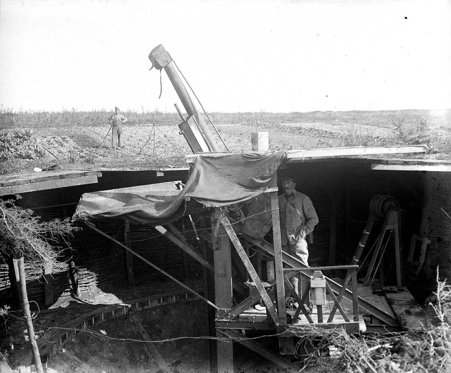 "Lieut. Disserteune". Le Lieutenant Disserteune pose près d'une pièce de calibre 75 de la DCA 129 à la ferme de Monthussard près de Brenelle (Aisne). 1917. Guerre 1914-1918.